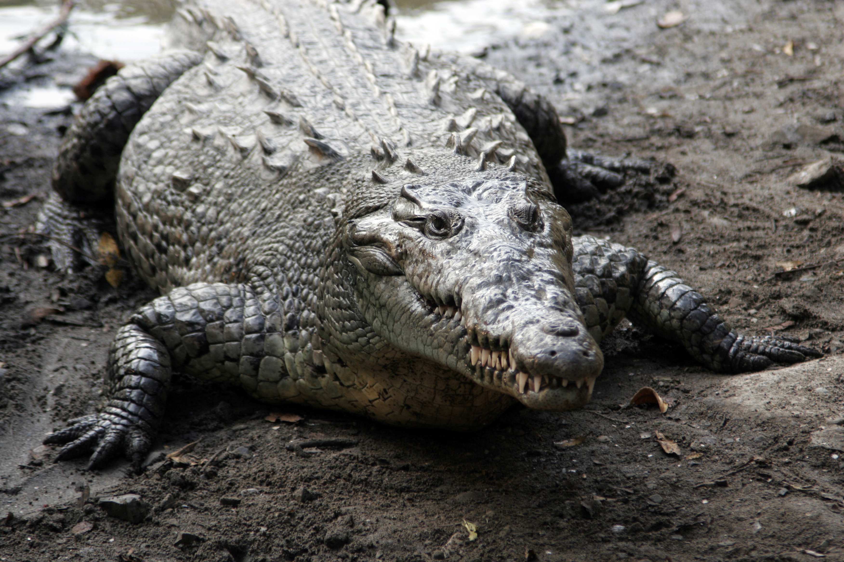 Crocodylus acutus, American Crocodile, Cocodrilo Americano. Photo taken at La Manzanilla, Jalisco, Mexico